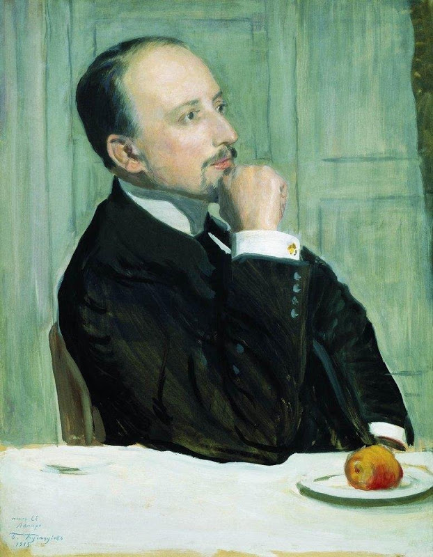 Б.М.Кустодиев «Портрет Е.Е.Лансере» 1913